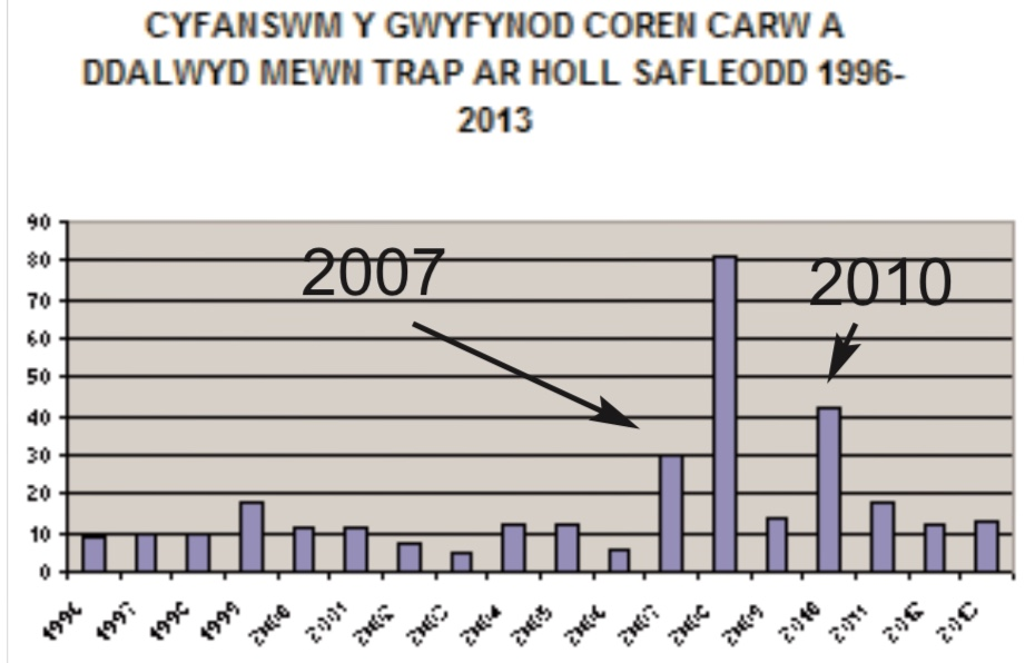 Graff yn dangos niferoedd blynyddol gwyfyn y corn carw mewn trap ar nifer o safleoedd yng Nghymru 1996-2013